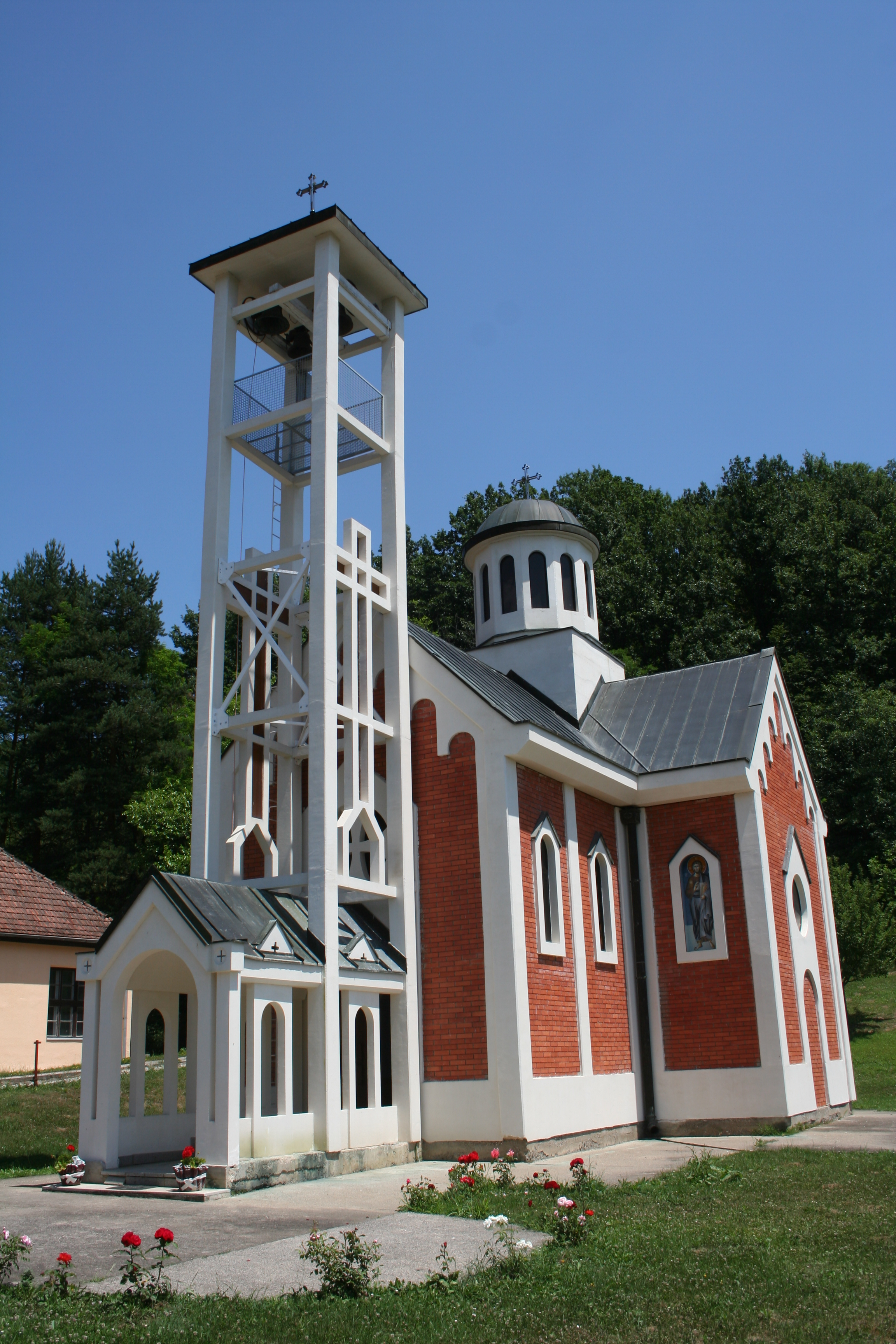 Crkva Sv. Petke Koštunići